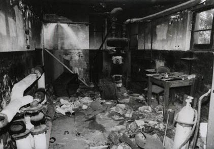 Zdjęcie ze strony skłotu Rozbrat. Za zgodą kolektywu. Skłot przed remontem.